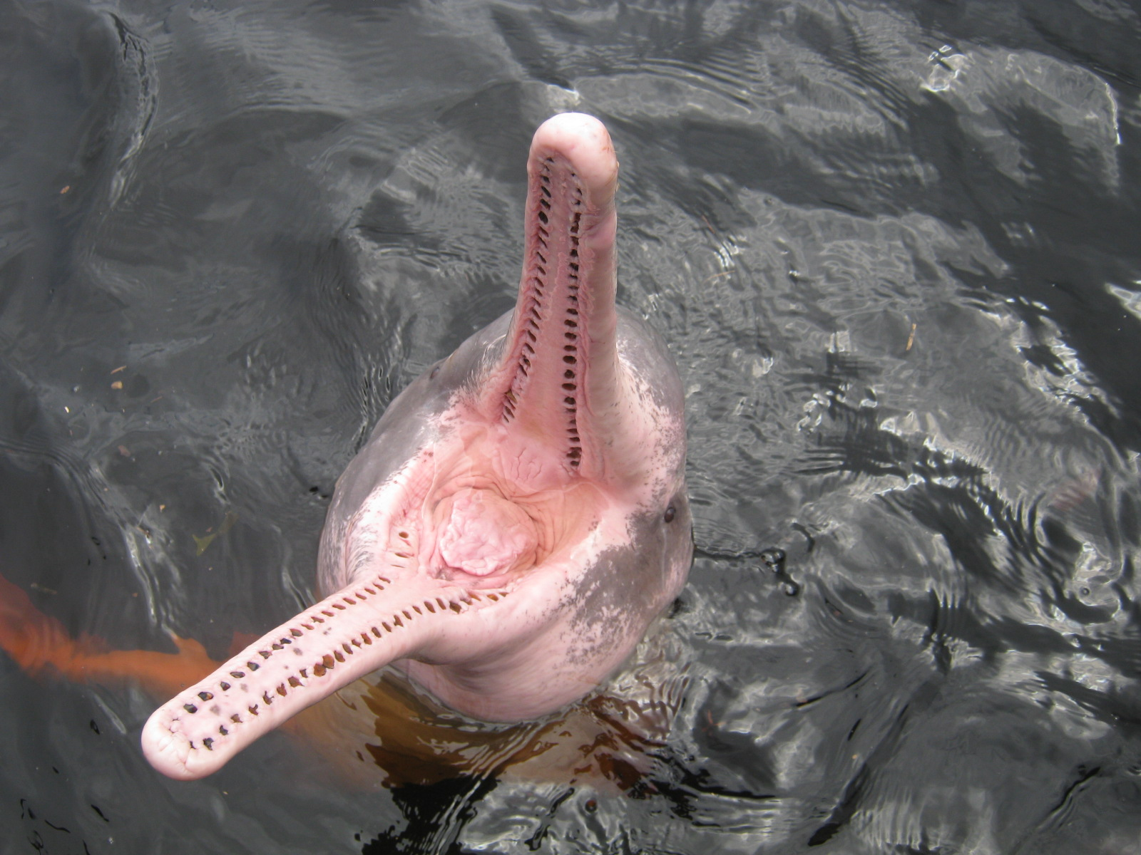 דולפין נהרות אמזוני עם פה פתוח